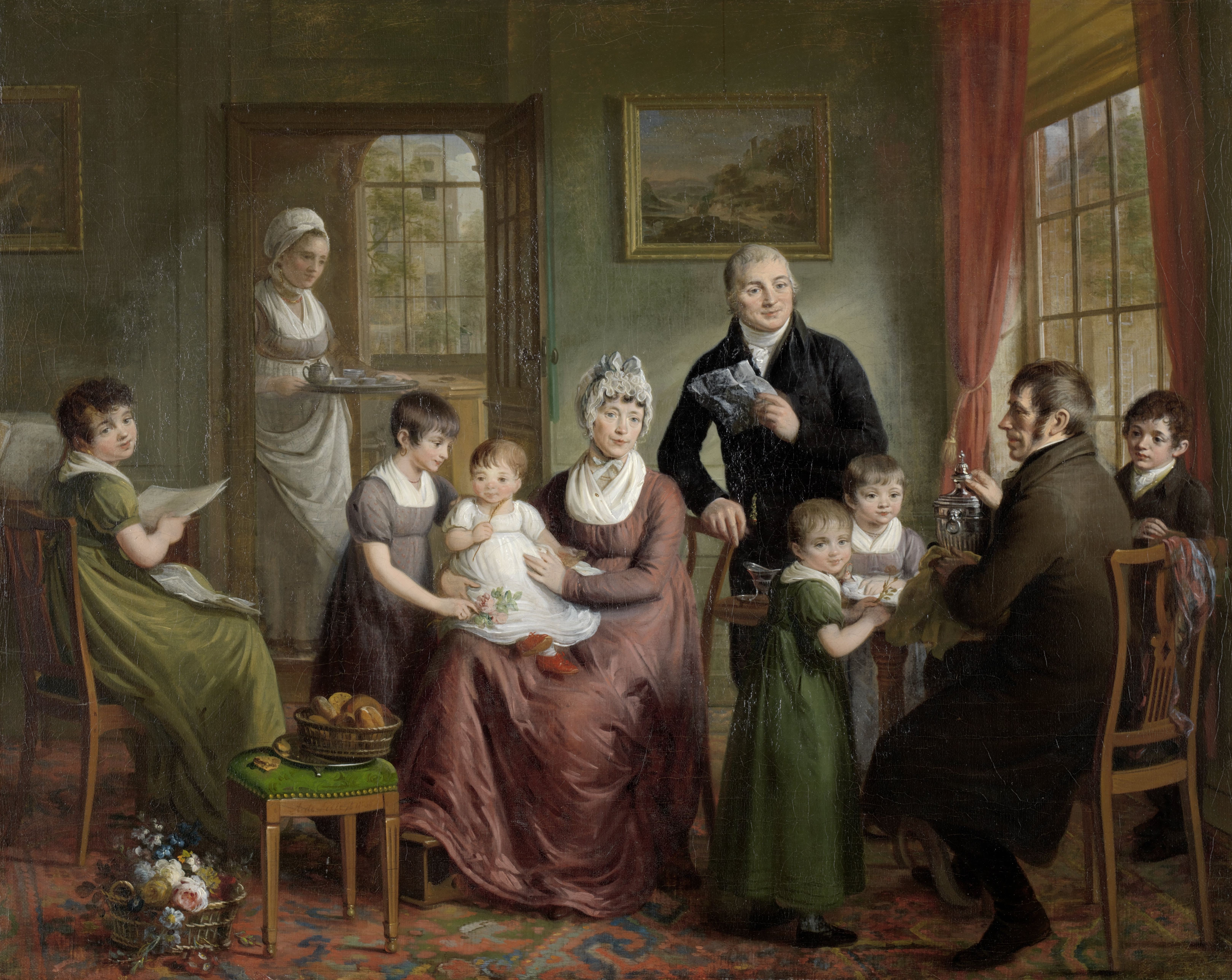 Portret van de familie van Adrianus Bonebakker met Dirk L. Bennewitz, Adriaan de Lelie, 1809. Bezoek van Dirk Lodewijk Bennewitz aan het echtpaar Adrianus en Elisabeth Bonebakker-Du Pré en hun kinderen. Een groepsportret van de familie Bonebakker en de compagnon Bennewitz, in de huiskamer van vermoedelijk Bonebakkers woning. Een dienstmeid in de deuropening brengt thee, achter haar is een doorkijk naar een kantoor. Door de twee ramen zijn grachtenhuizen te zien. Mevrouw Bonebakker houdt haar jongste op schoot, de overige vijf kinderen spelen met de baby, een boek, muziek en speelgoed. Dirk Lodewijk Bennewitz houdt een zilveren kastanjevaas of tabakspot in de hand, Adrianus Bonebakker een brief of document. Twee zilveren manden op de grond en op een krukje verwijzen naar de firma Bonebakker en Bennewitz, zilversmeden te Amsterdam. Aan de muur hangen twee schilderijen: arcadisch landschap met ondergaande zon door Daniël Dupré en gezicht op Civita Castellana door Daniël Dupré.